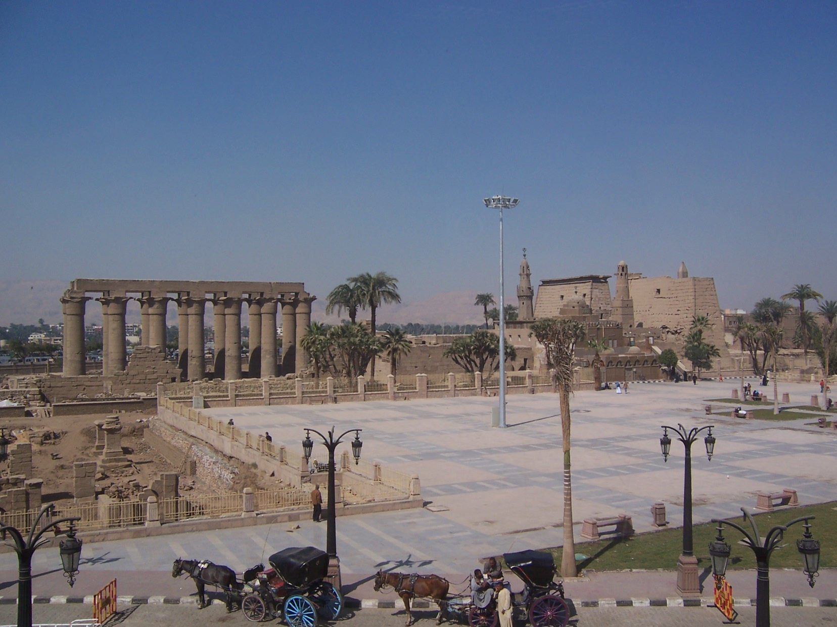 Luxor Temple at Luxor, Egypt